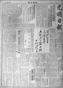 光明日報1949年6月16日創刊號